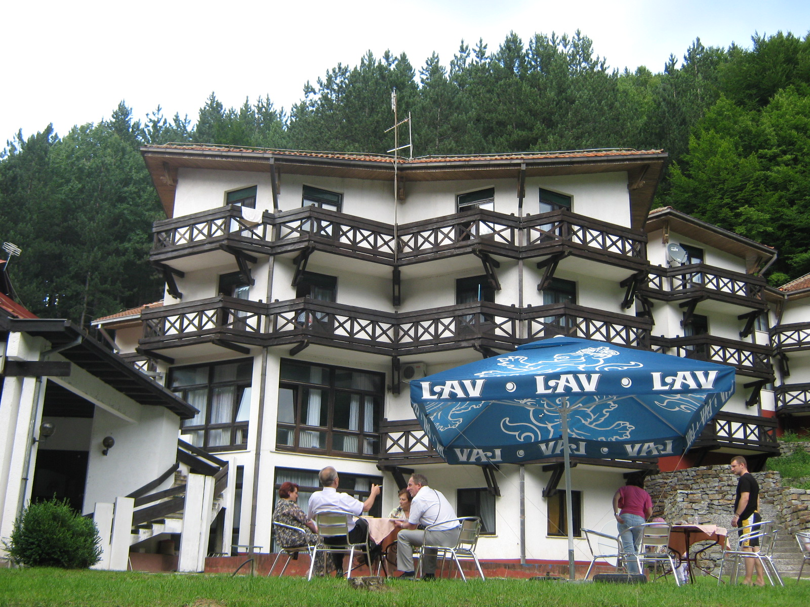 hotel Vlaina